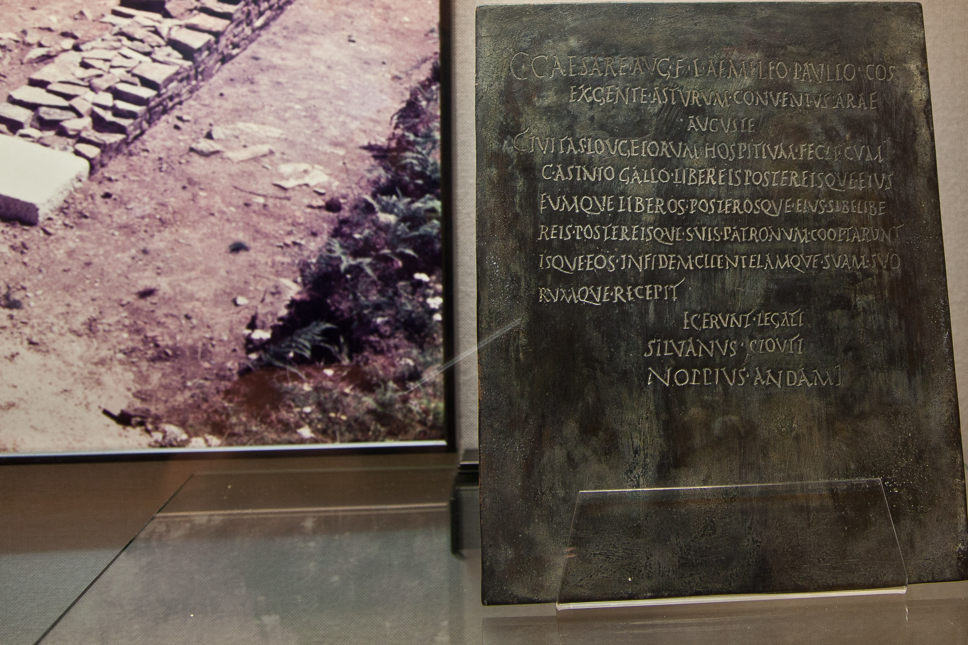 C(aio) CAESARE AUG(usti) F(ilio) (et) L(ucio) AEMILIO PAULLO CO(n)S(ulibus)/ EX GENTE ASTURUM CONVENTUS ARAE/ AUGUST(a)E/ CIVITAS LOUGEIORUM HOSPITIUM FECIT CUM/ C(aio) ASINIO GALLO LIBEREIS POSTEREISQUE EIUS/ EUMQUE LIBEROS POSTEROSQUE EIUS SIBI LIBE/REIS POSTEREISQUE SUIS PATRONUM COOPTARUNT/ ISQUE EOS IN FIDEM CLIENTELAMQUE SUAM SUO/RUMQUE RECEPIT/ EGERUNT LEGATI/ SILVANUS CLOUTI/ NOBBIUS ANDAMI. Durante o consulado de Caio César, fillo de Augusto, e Lucio Emilio Paulo, a civitas (cidade) dos Lougei, do convento Ara Augusta, do pobo dos ástures, estableceu un pacto de hospitalidade con Caio Asinio Galo, cos seus fillos e descendentes. Nomeárono o seu patrón, a el, aos seus fillos e aos seus descendentes, en favor deles, dos seus fillos e descendentes, e el recibiunos na súa clientela e na dos seus, ofrecéndolles fidelidade. Actuaron como legados Silvano Clouti e Nobbio Andami. (ano I d.C. Procedencia descoñecida)